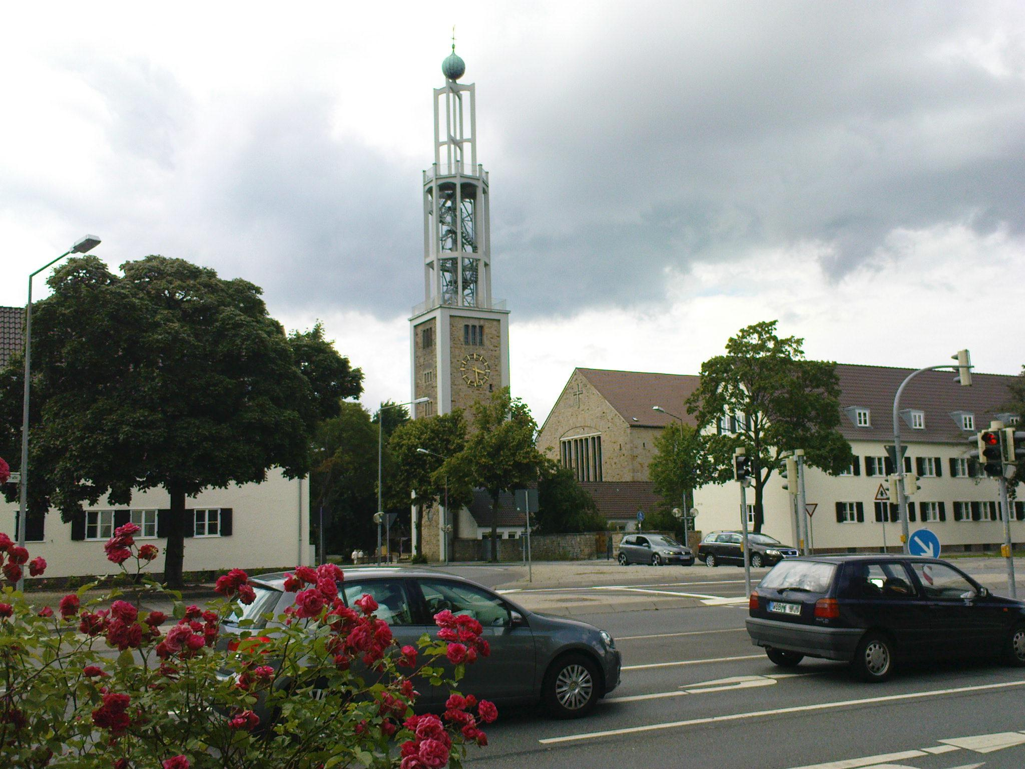 Blick auf den Stadtteil Schillerteich mit St. Christophorus und Wohngebäuden